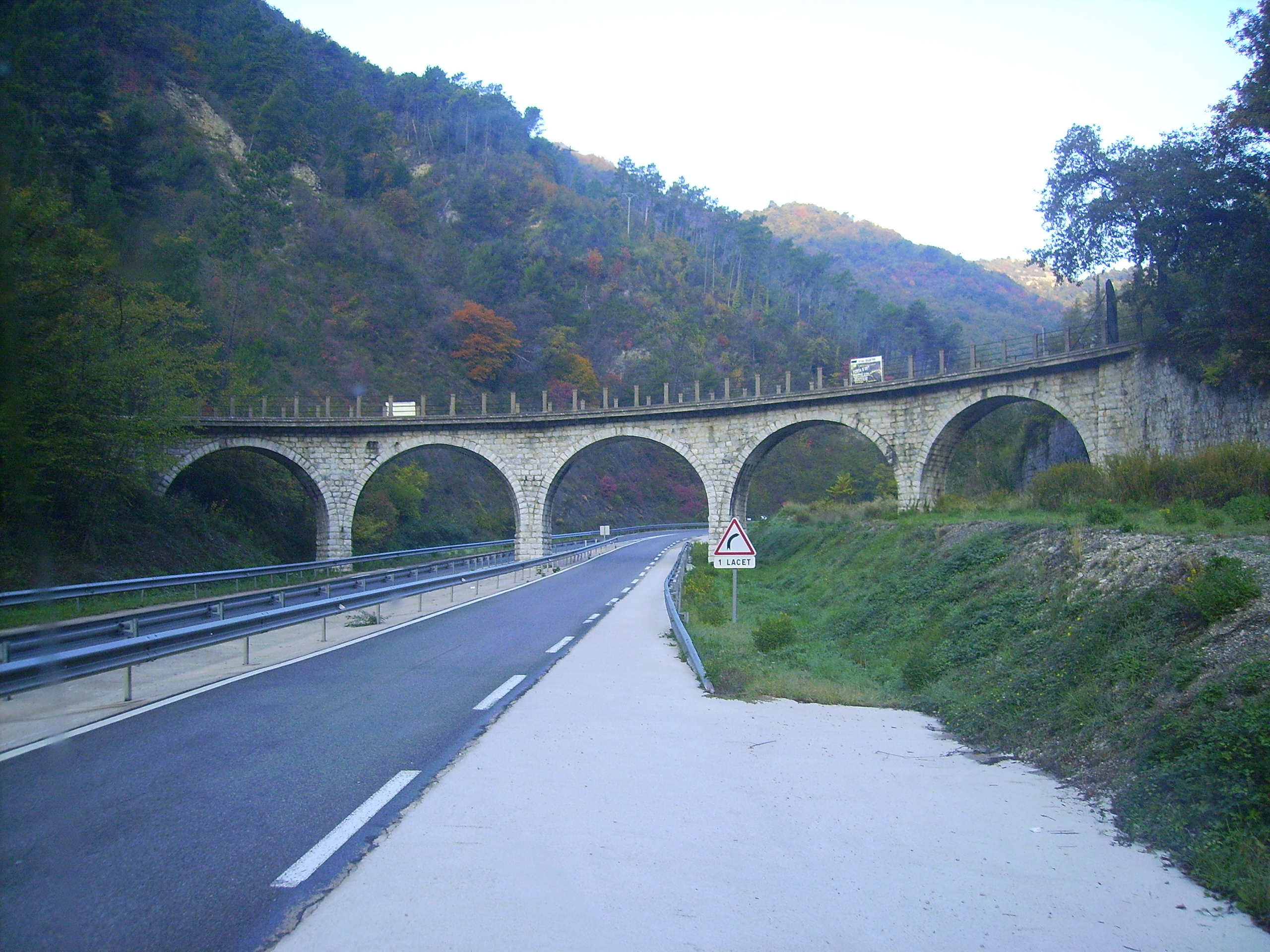 Viaduc du Carrei, construit en 1912, de l'ancien tramway qui reliait Menton à Sospel et a cessé de fonctionner en 1931